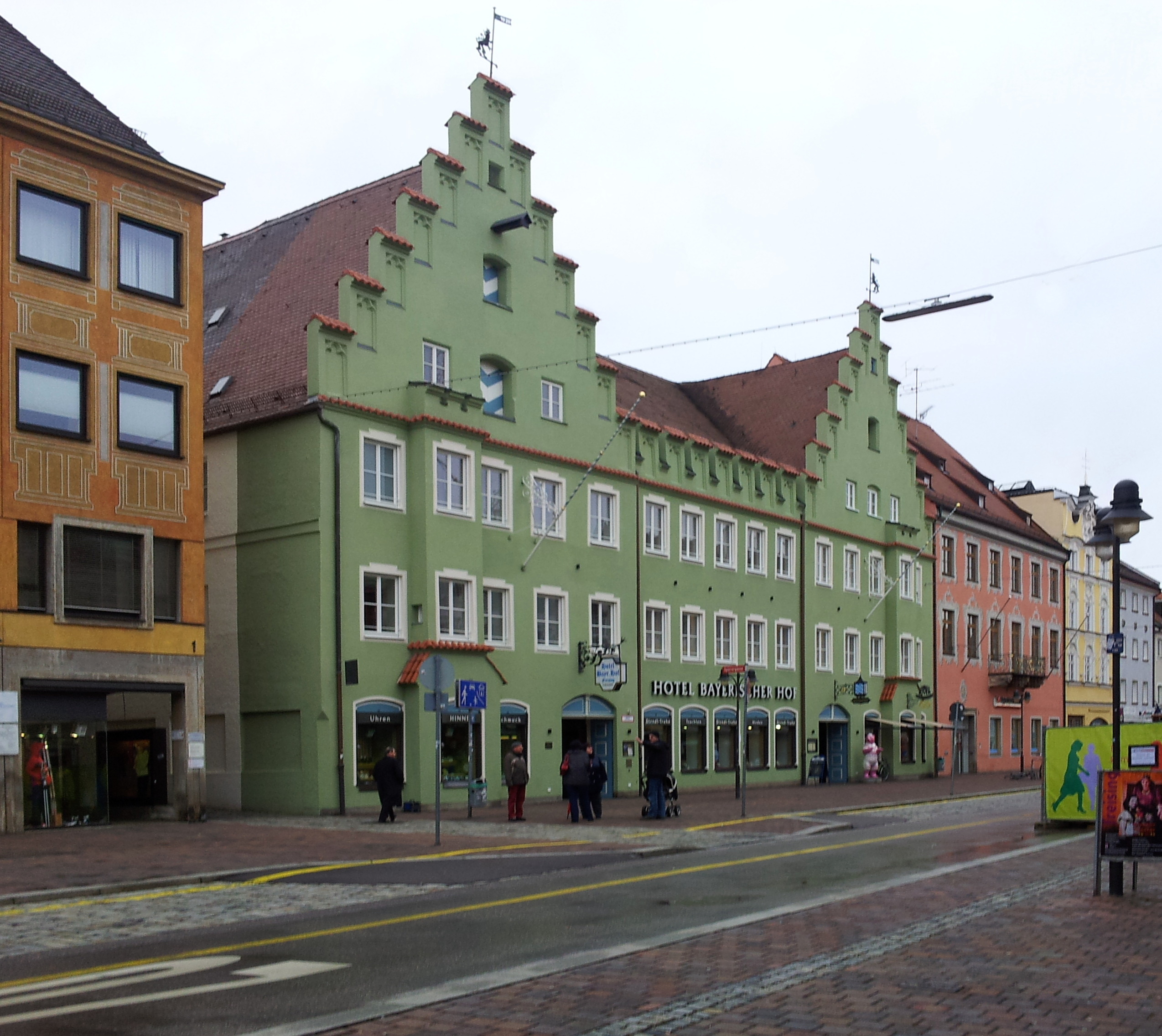 Untere Hauptstraße 3; Hotel Bayerischer Hof, straßenseitiger Flügel mit zwei neugotischen Treppengiebeln und Zinnen, um 1860 an der Stelle von drei Vorgängern neu erbaut. D-1-78-124-204